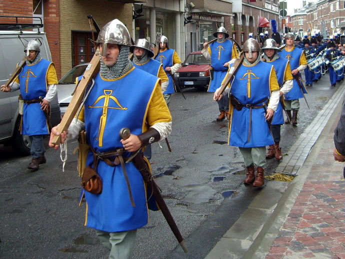 700-jarig bestaansfeest van "La société royale des Arbalétriers visétois" op zondag 8 augustus 2010.